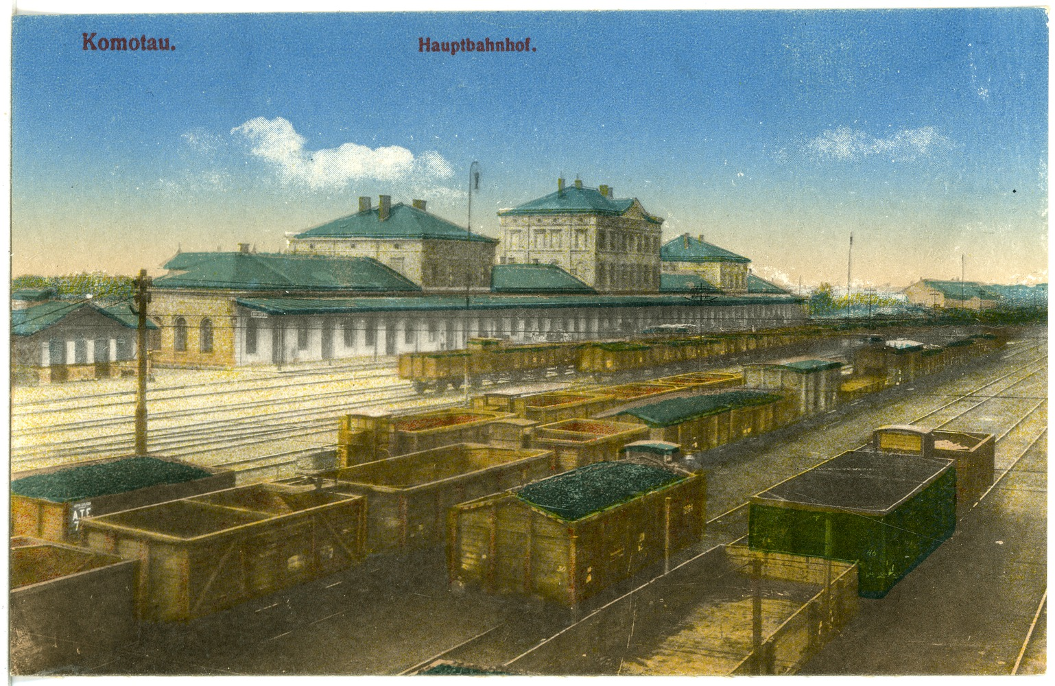 Komotau; Hauptbahnhof This postcard is from publisher Brück & Sohn in Meißen ( postcard has a unique number 20358 and is available in a higher resolution at the publisher. This images was uploaded in a cooperation project between Wikipedians and the publisher.